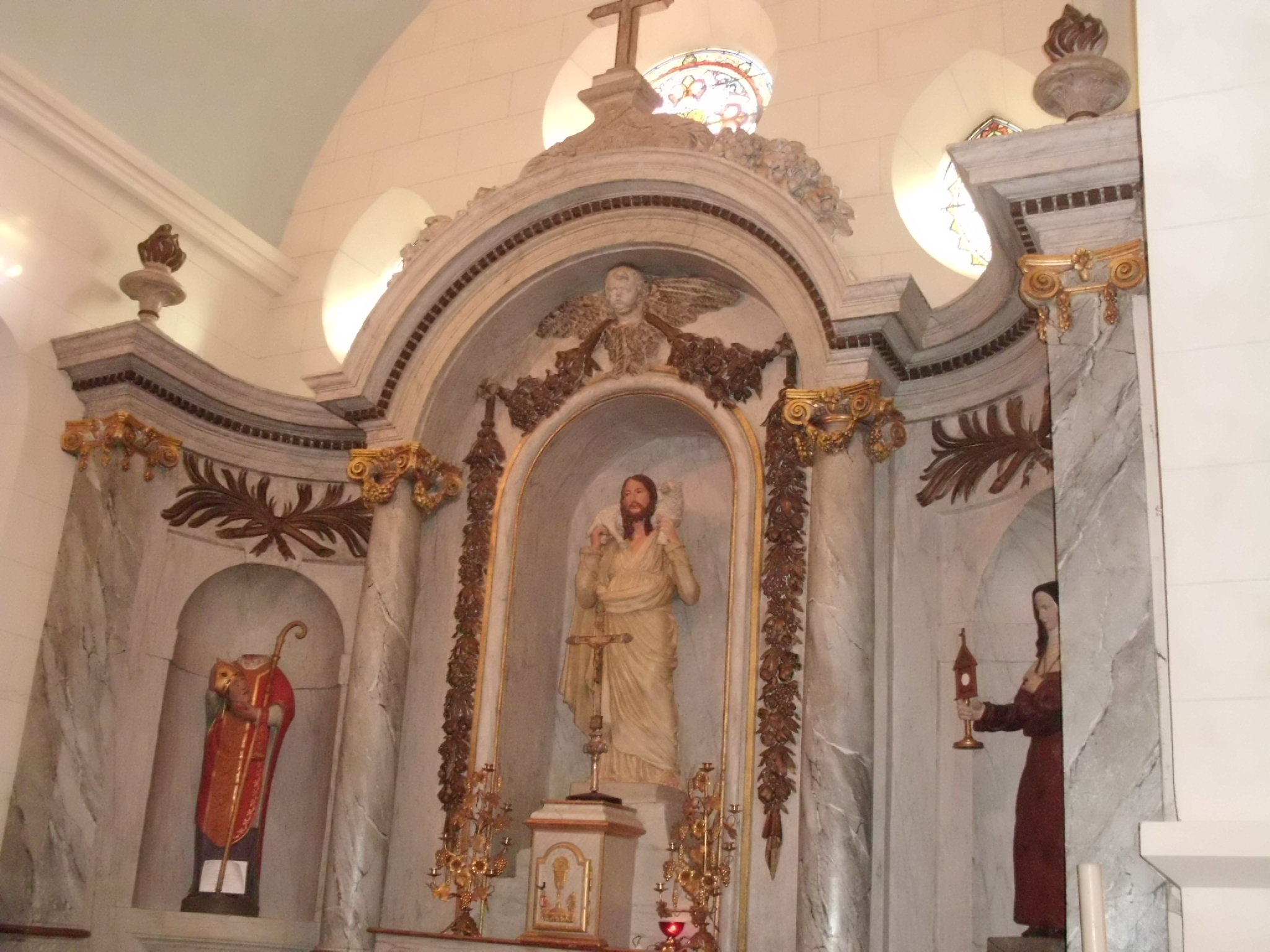 rétable avec statues de Saint Denis, du bon Pasteur et de sainte Claire (à peine visible) dans l'église Saint Denis de Coulanges (Loir-et-Cher)